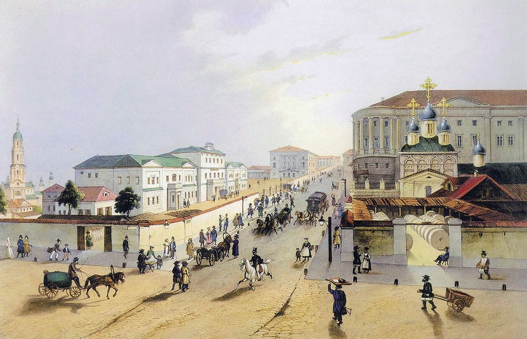 Литография А.Ш. Мюллера с оригинала Ф. Дица 1840-е гг. Москва. Слева - Почтамт. Справа - церковь Флора и Лавра и Юшков дом.